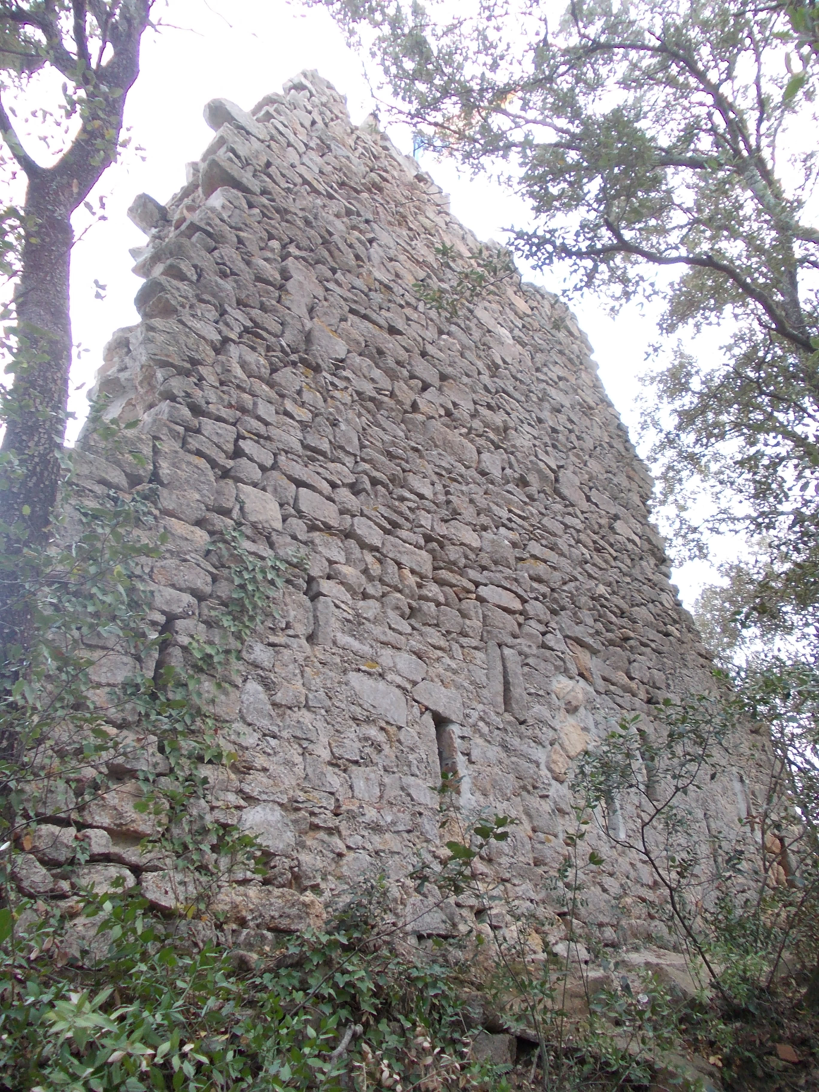 Paret nord de les ruïnes del Castell de Dosrius, amb espitlleres